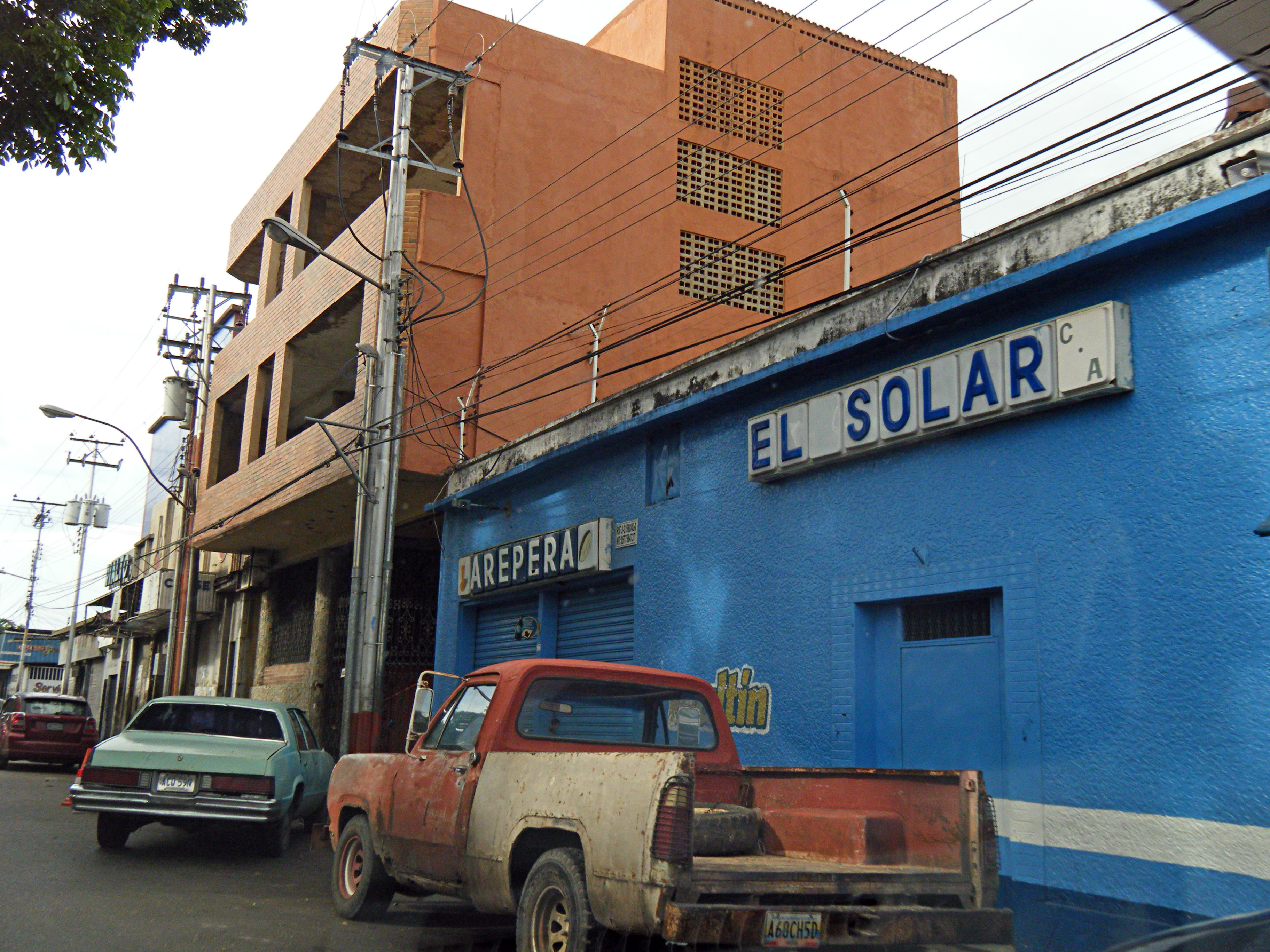 Arepera El Solar en la Av. Parmera de Maturin, Estado Monagas, Venezuela.